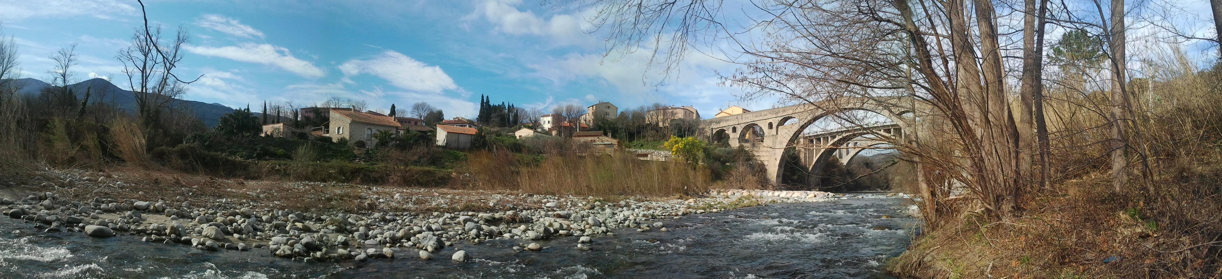 Les berges du Tech et les trois ponts de Céret